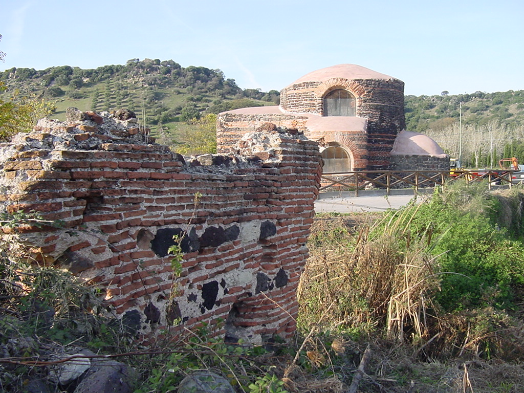 Veduta della chiesa di Mesumundu. In primo piano i resti dell'acquedotto romano